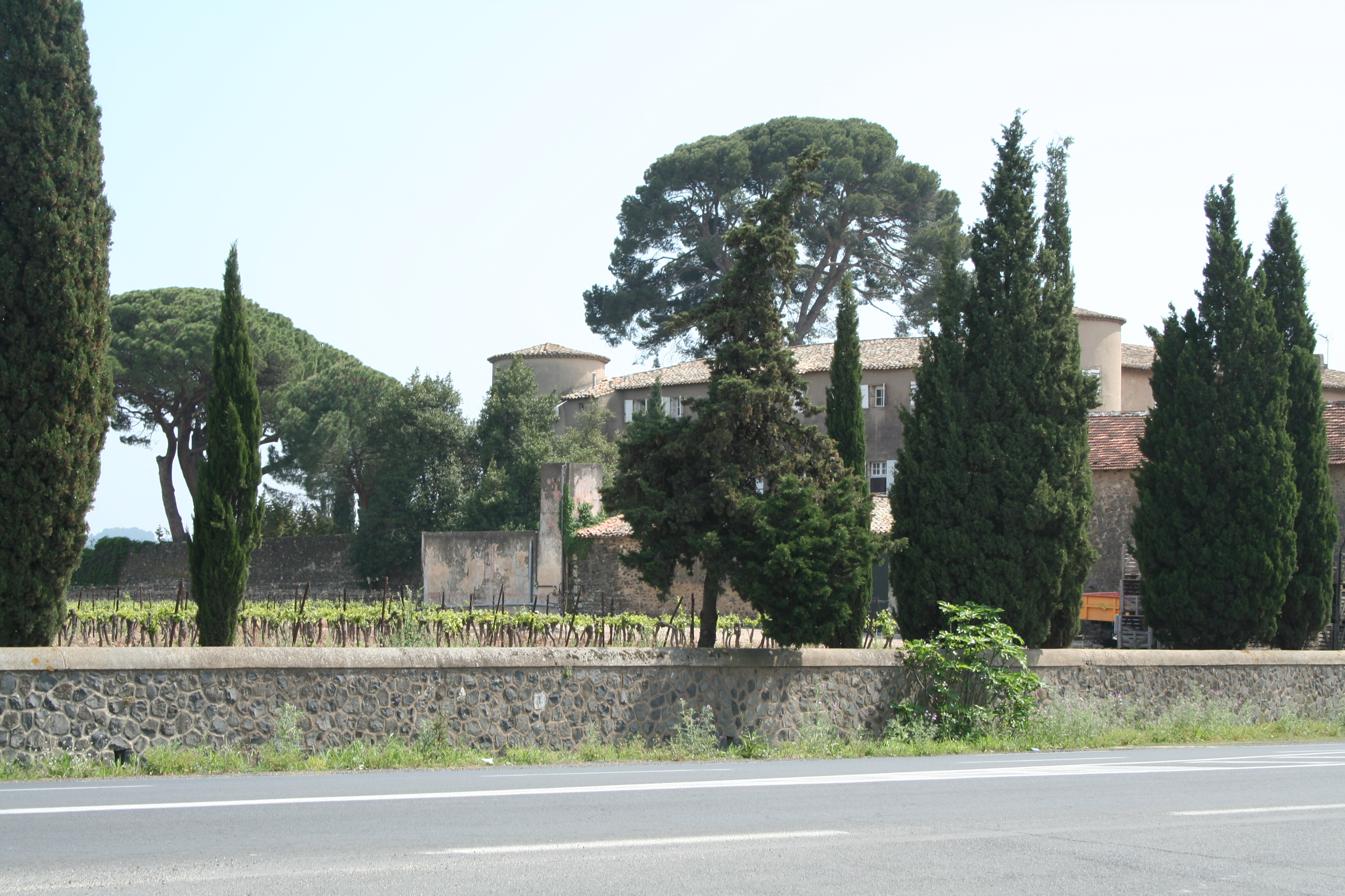 Lézignan-la-Cèbe (Hérault) - Château.